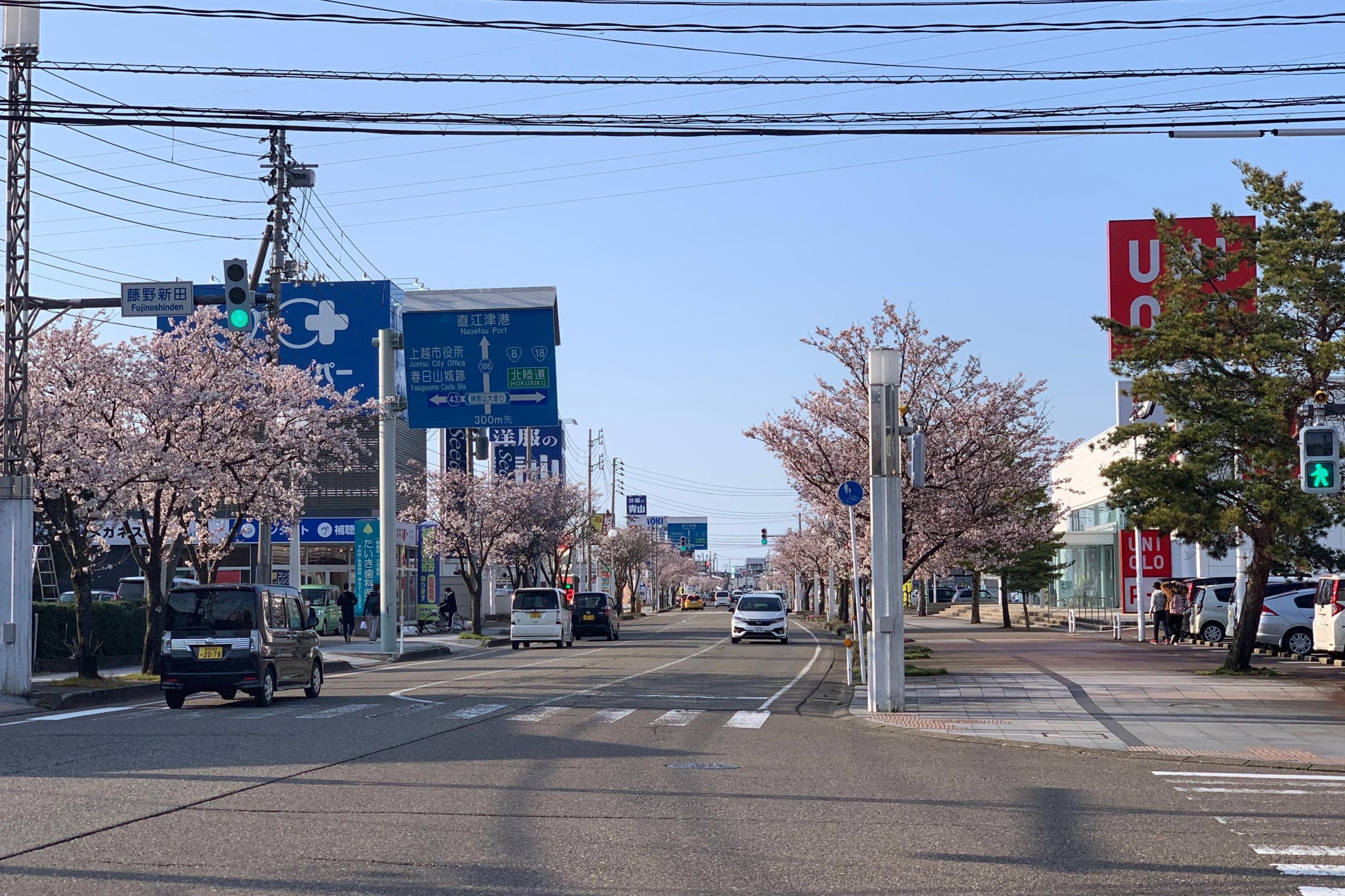 新潟県道186号板倉直江津線 藤野新田交差点付近（2020年4月）